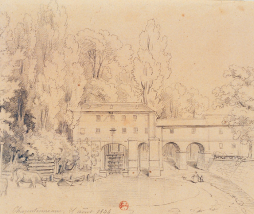 Dessin représentant un moulin à eau, des douves et une murraille, domaine de Charentonneau, par Charles Nicolas les Ransonnette, 1846